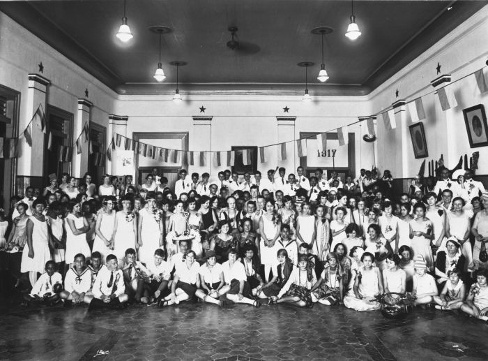 Foto. Groepsportret met de schoolleerlingen van de Carpentier Alting Stichting (CAS) tijdens een feest